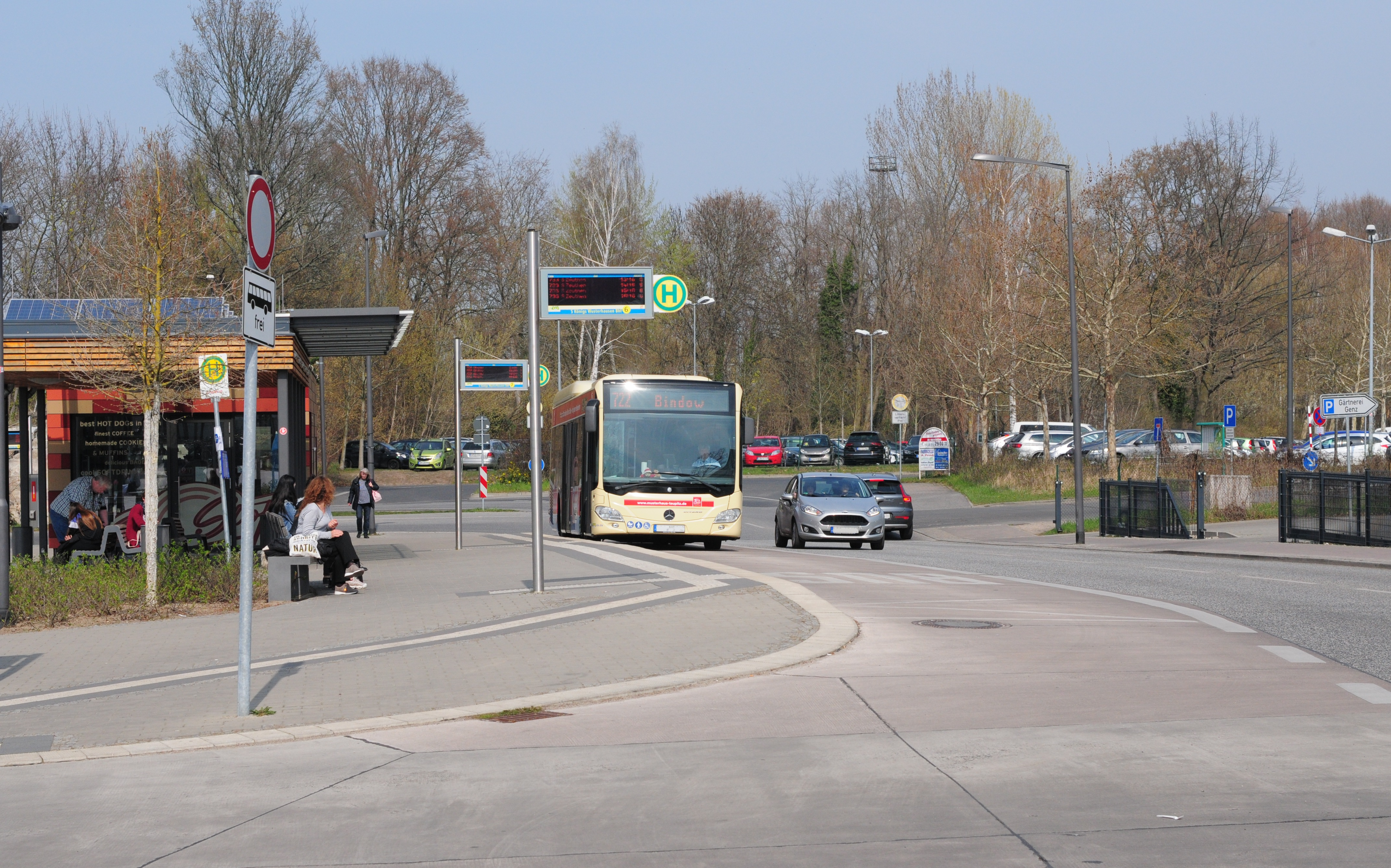 Königs Wusterhausen, Busterminal Storkower Straße am Bahnhofsgelände (Land Brandenburg)